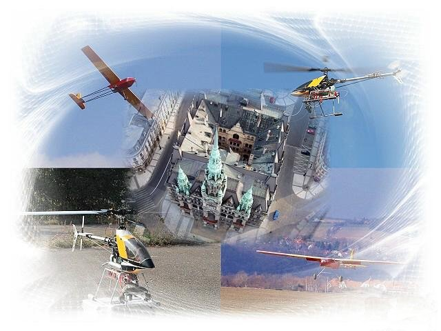 Letecká fotografie - intro